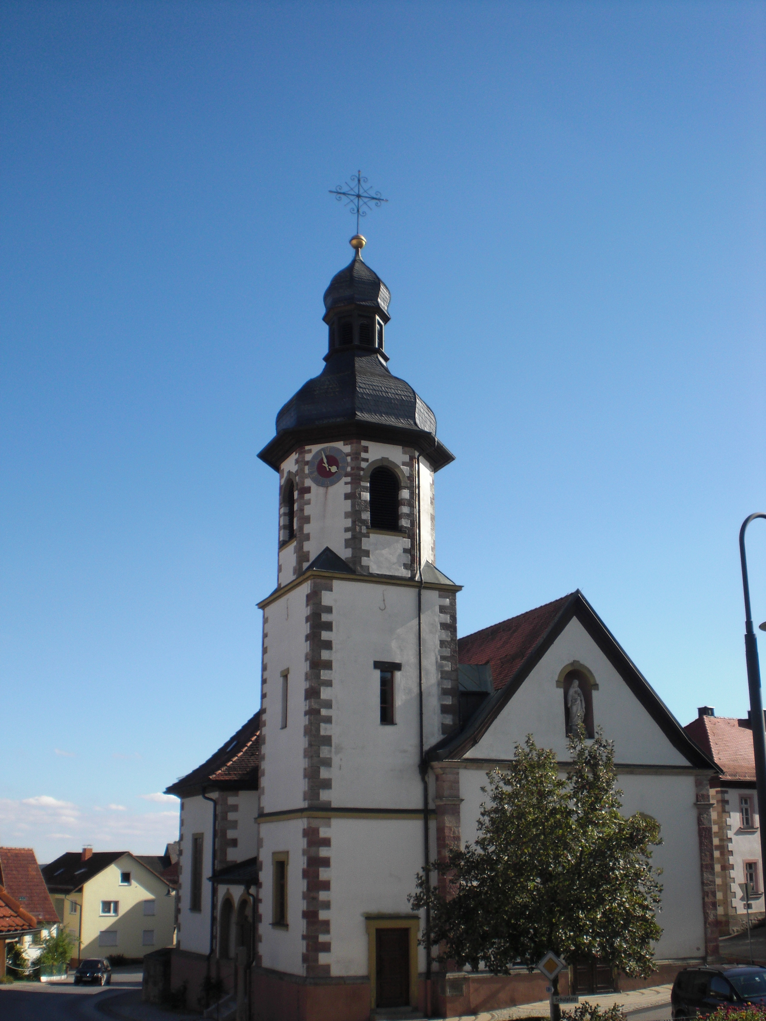 St.-Sebastian-Kirche in Stangenroth